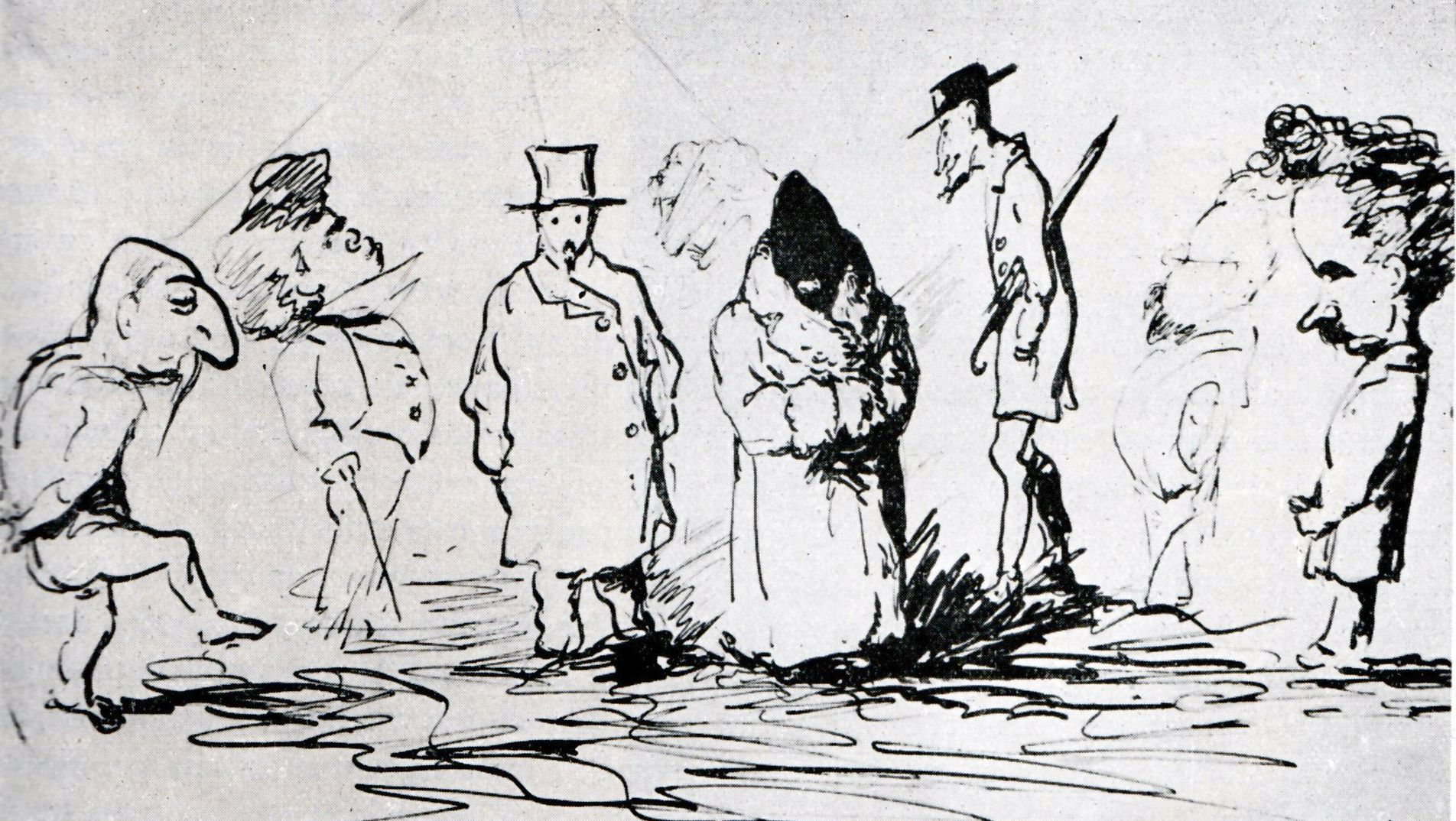 Familiarii cafenelei Guichard, peniță, nesemnat - Muzeul de Artă din Cluj